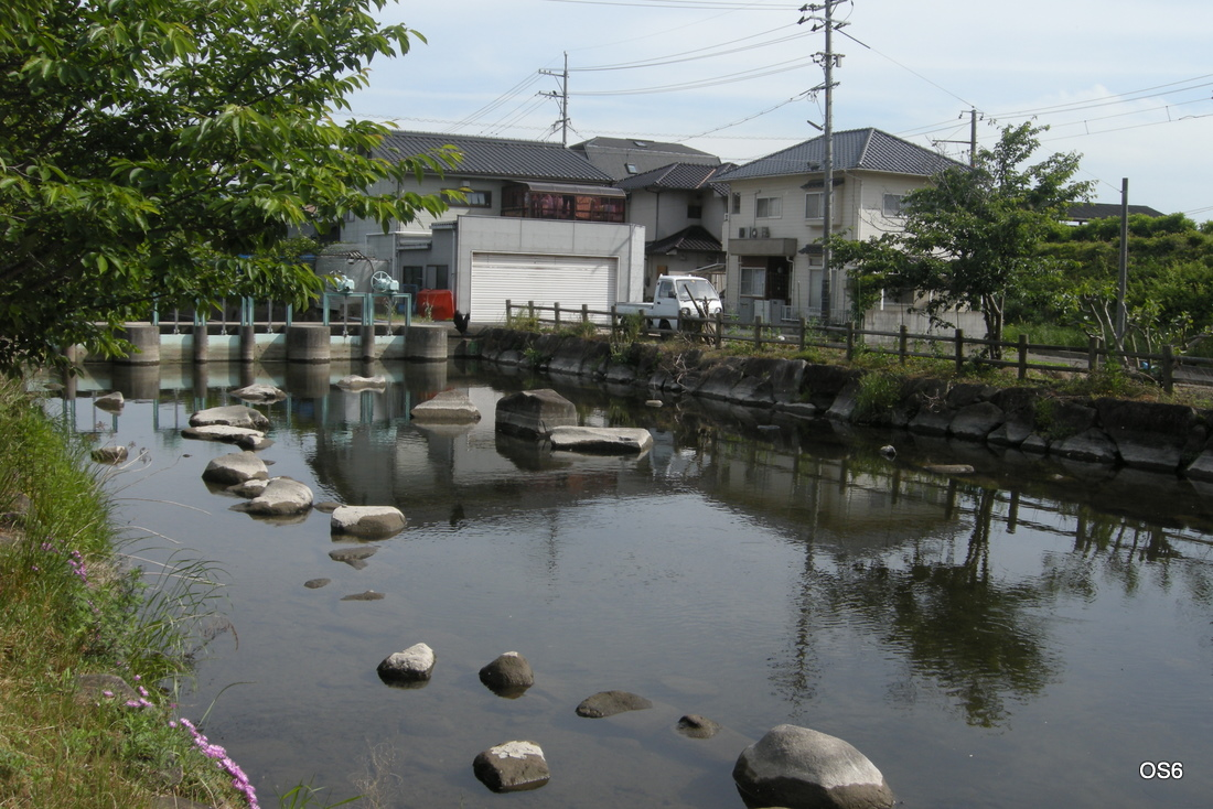 広島県福山市の丸川分水